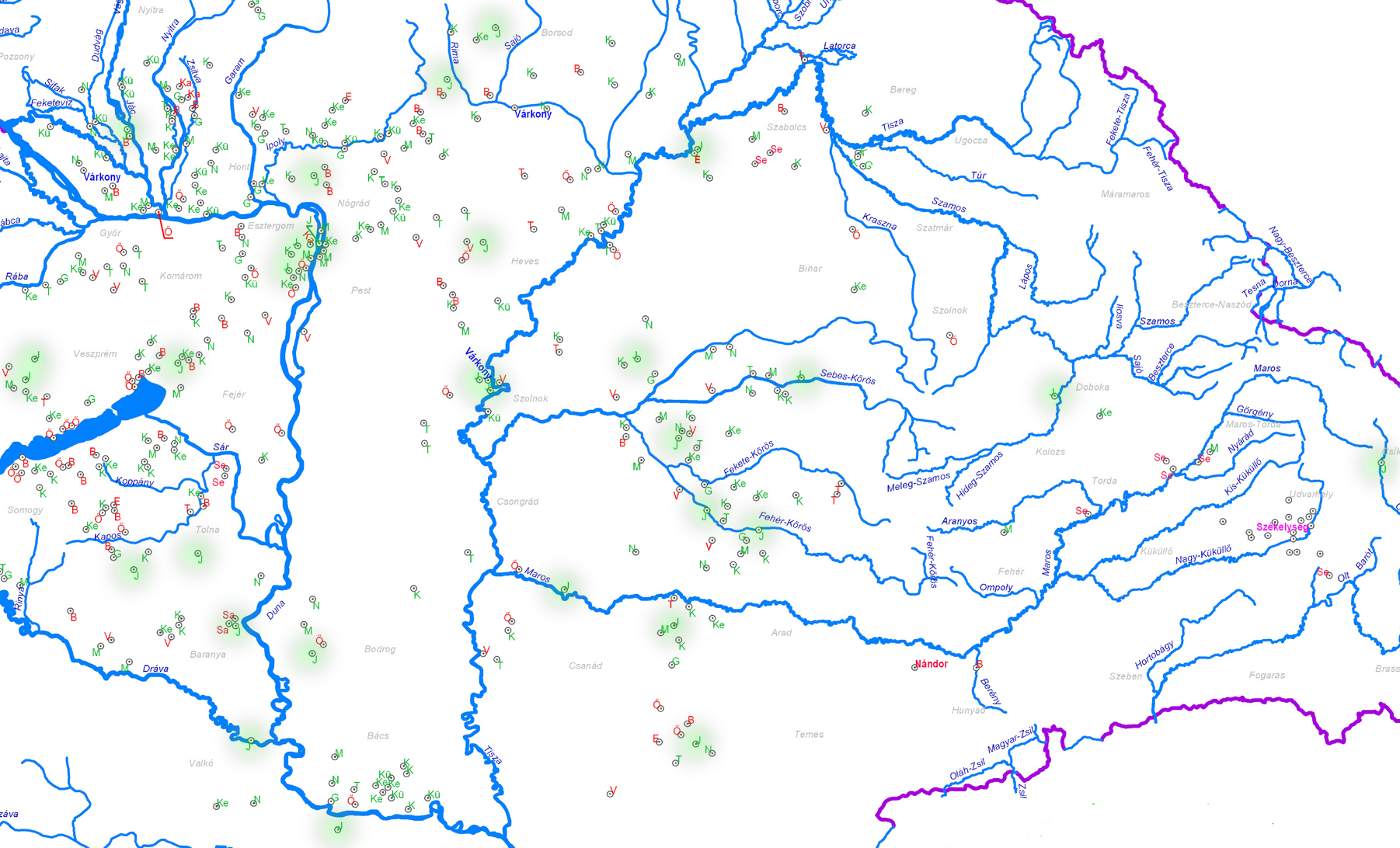 A jenő törzsnév elterjedése a Kárpát-medencében